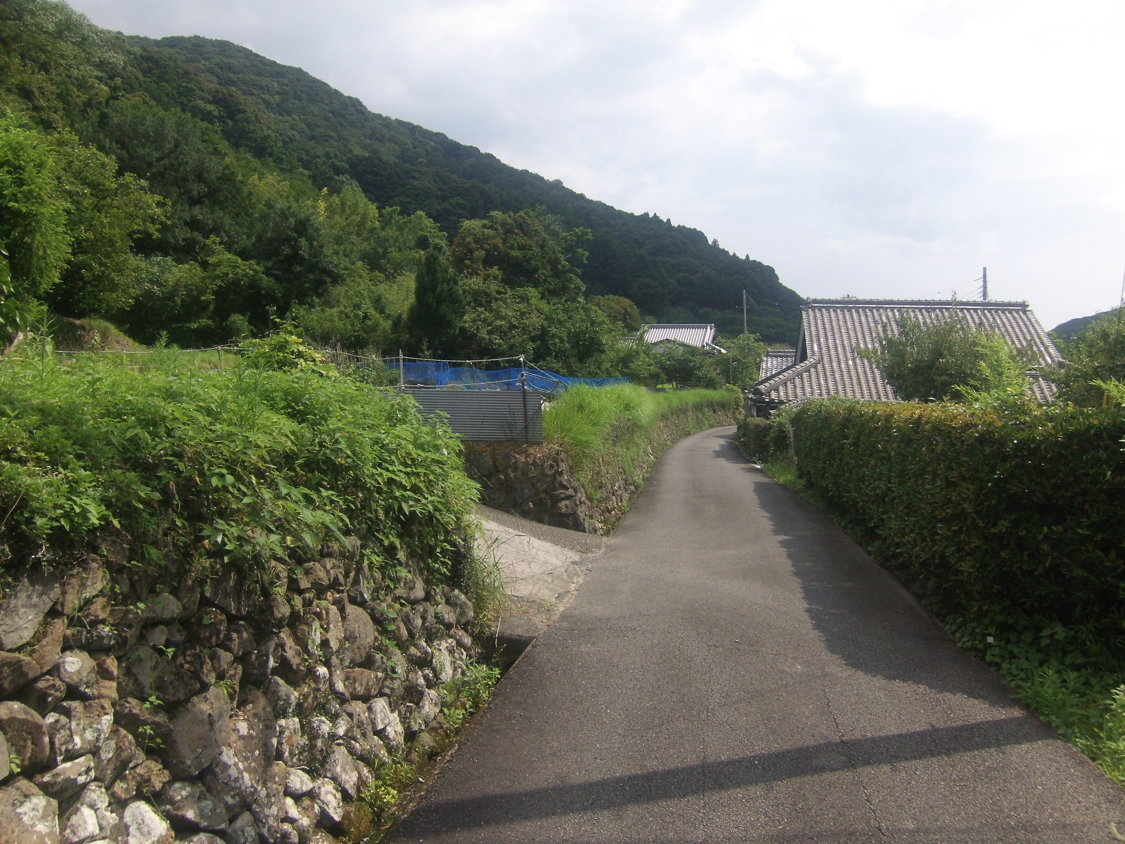 熊野古道・紀伊路が抜ける原谷集落の里山景観